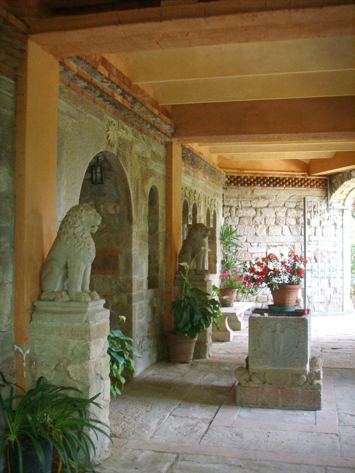 Villa nieunwekamp